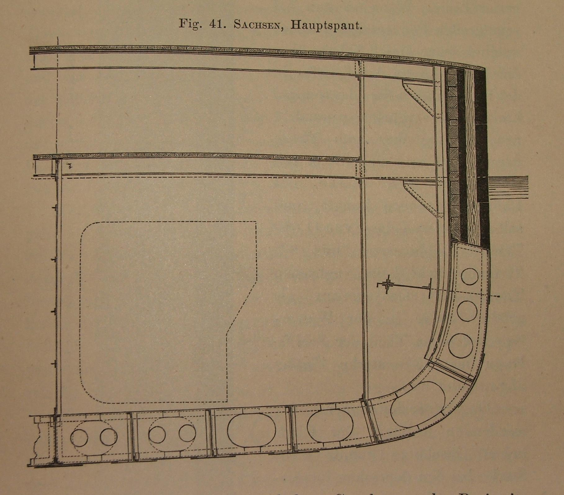 SMSSachsen aus: von Kronenfels, J. F.: Das schwimmende Flottenmaterial der Seemächte. Eine kurzgefasste Beschreibung der wichtigsten europäischen, amerikanischen und asiatischen Kriegsschiffe der neueren und neuesten Zeit. A. Hartleben's Verlag, Wien. Pest. Leipzig 1881.